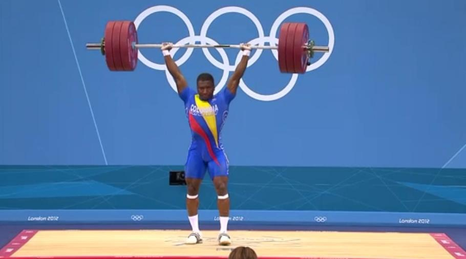 Medalla de plata y record olimpico en envion (177kg)